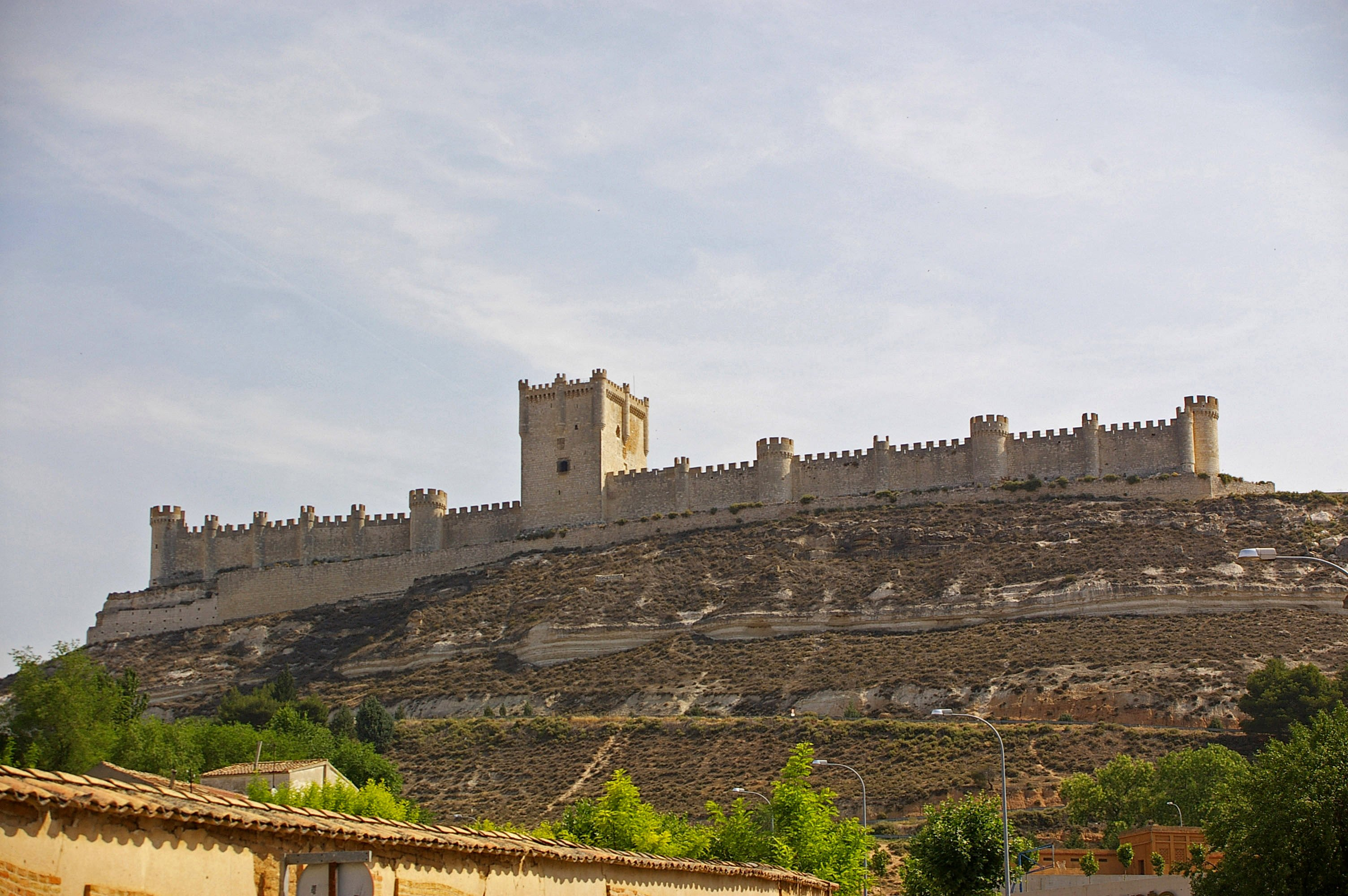 Vista del castillo de Peñafiel (Valladolid). Main view of the castle of Peñafiel.